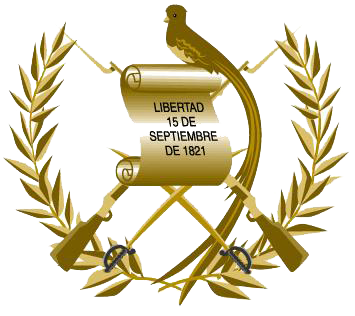 Coat of Arms of the President of the Republic of Guatemala